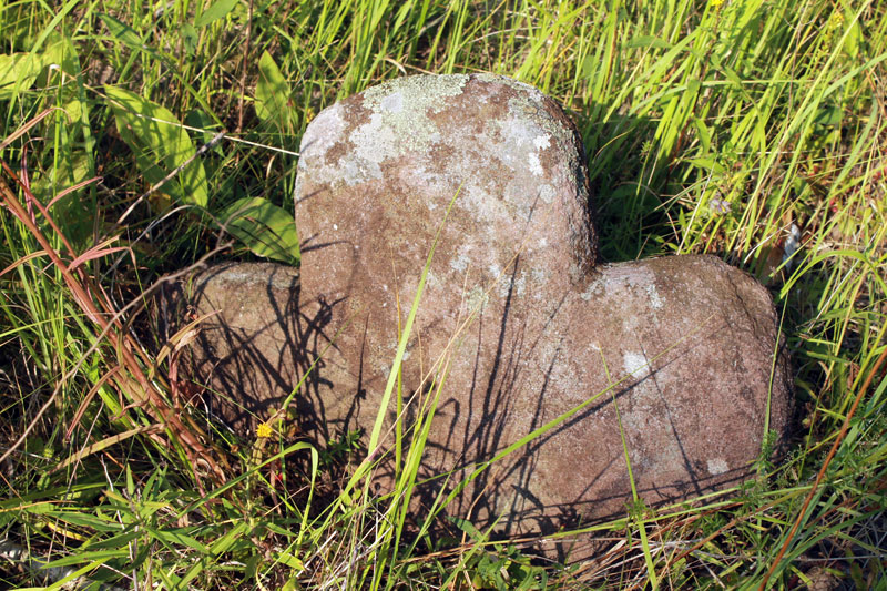 Андрыянава. Каменныя крыжы на могілках